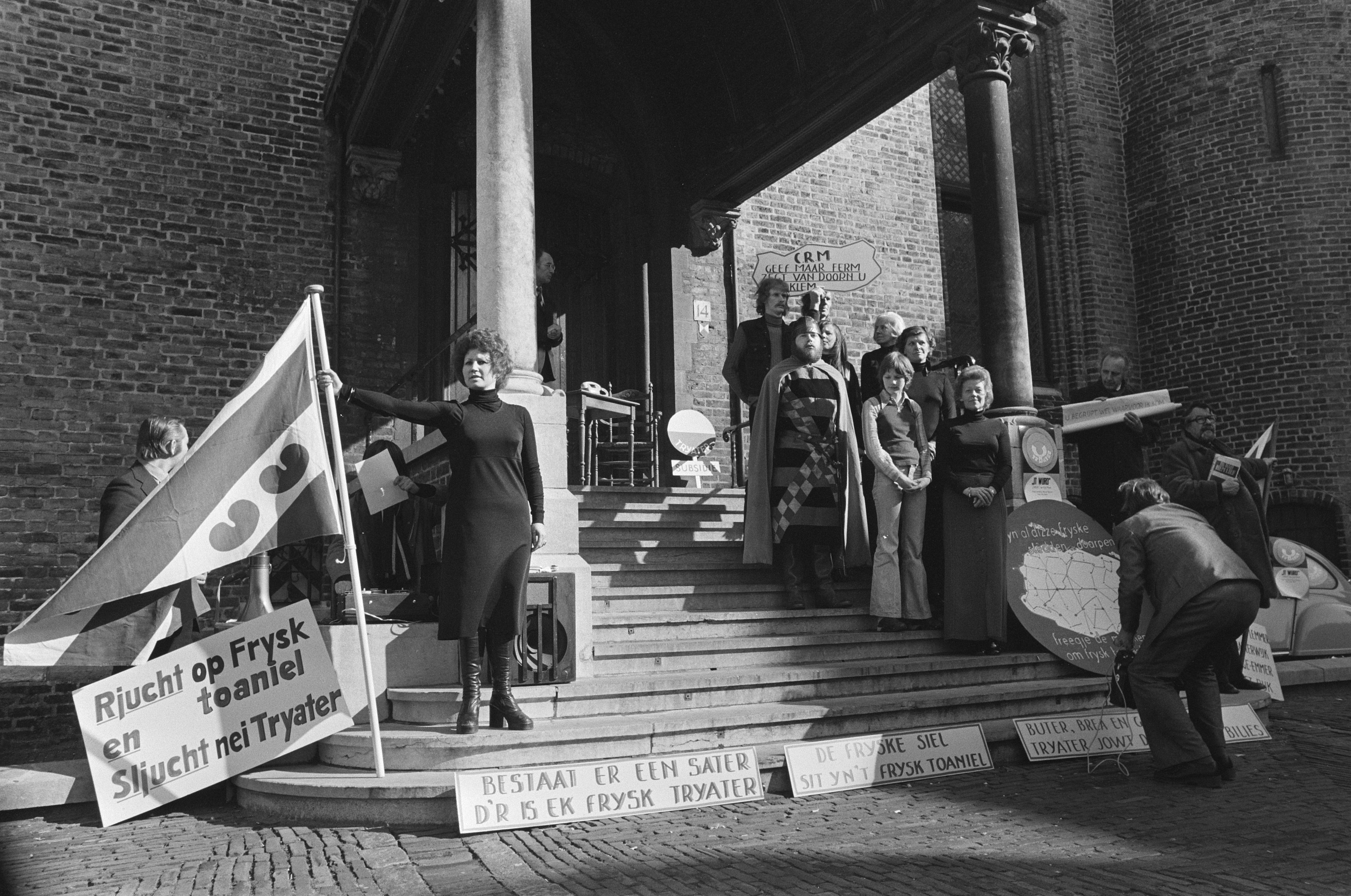 Collectie / Archief : Fotocollectie Anefo Reportage / Serie : [ onbekend ] Beschrijving : Fries toneelgezelschap "Tryater" op Binnenhof, petitie voor subsidie wordt aangeboden aan kamervoorzitter Vondeling Datum : 27 februari 1975 Locatie : Den Haag, Zuid-Holland Trefwoorden : TONEELGEZELSCHAPPEN, petities Fotograaf : Verhoeff, Bert / Anefo Auteursrechthebbende : Nationaal Archief Materiaalsoort : Negatief (zwart/wit) Nummer archiefinventaris : bekijk toegang 2.24.01.05 Bestanddeelnummer : 927-7799